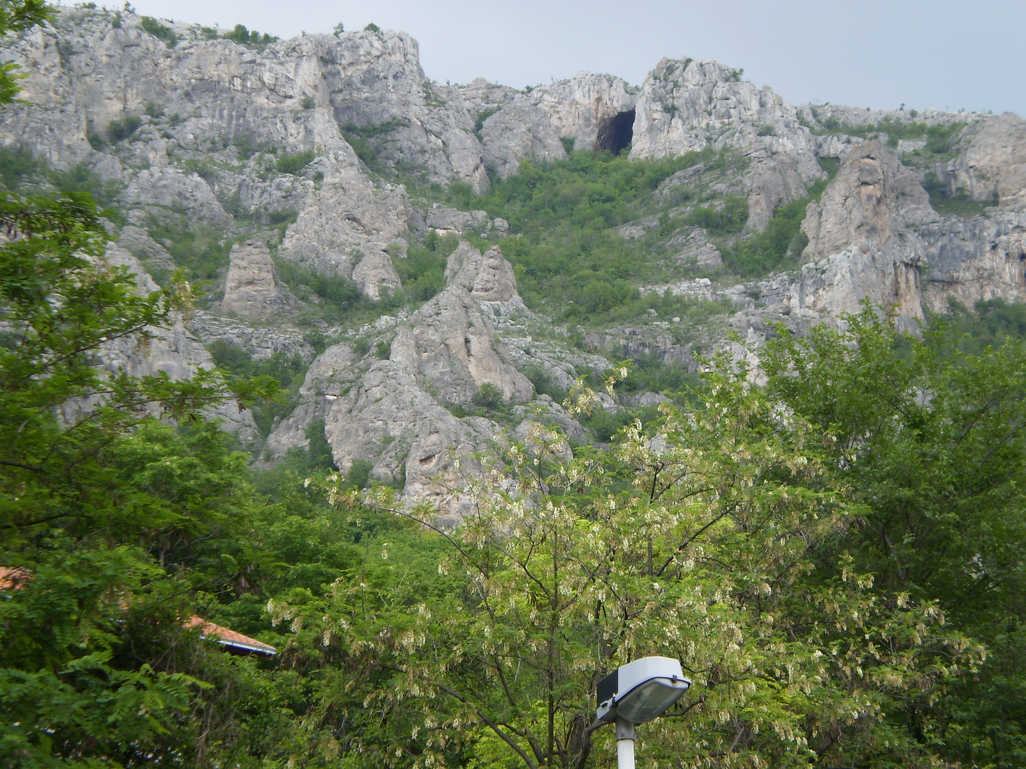 Jeadna od pećina u okolini naselja Sićevo u Sićevačkoj klisuri. 23.maj 2012